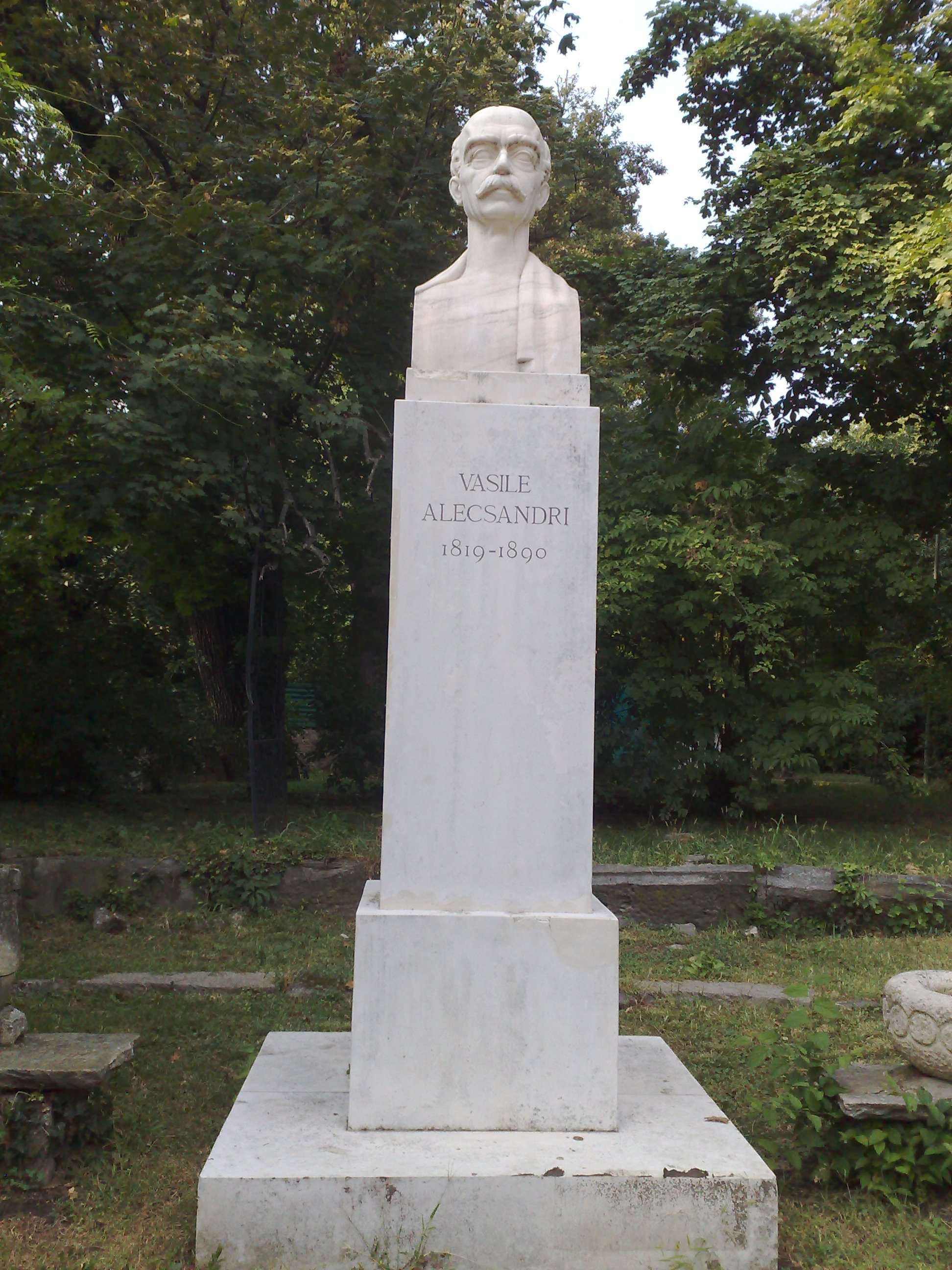 Bustul lui Vasile Alecsandri